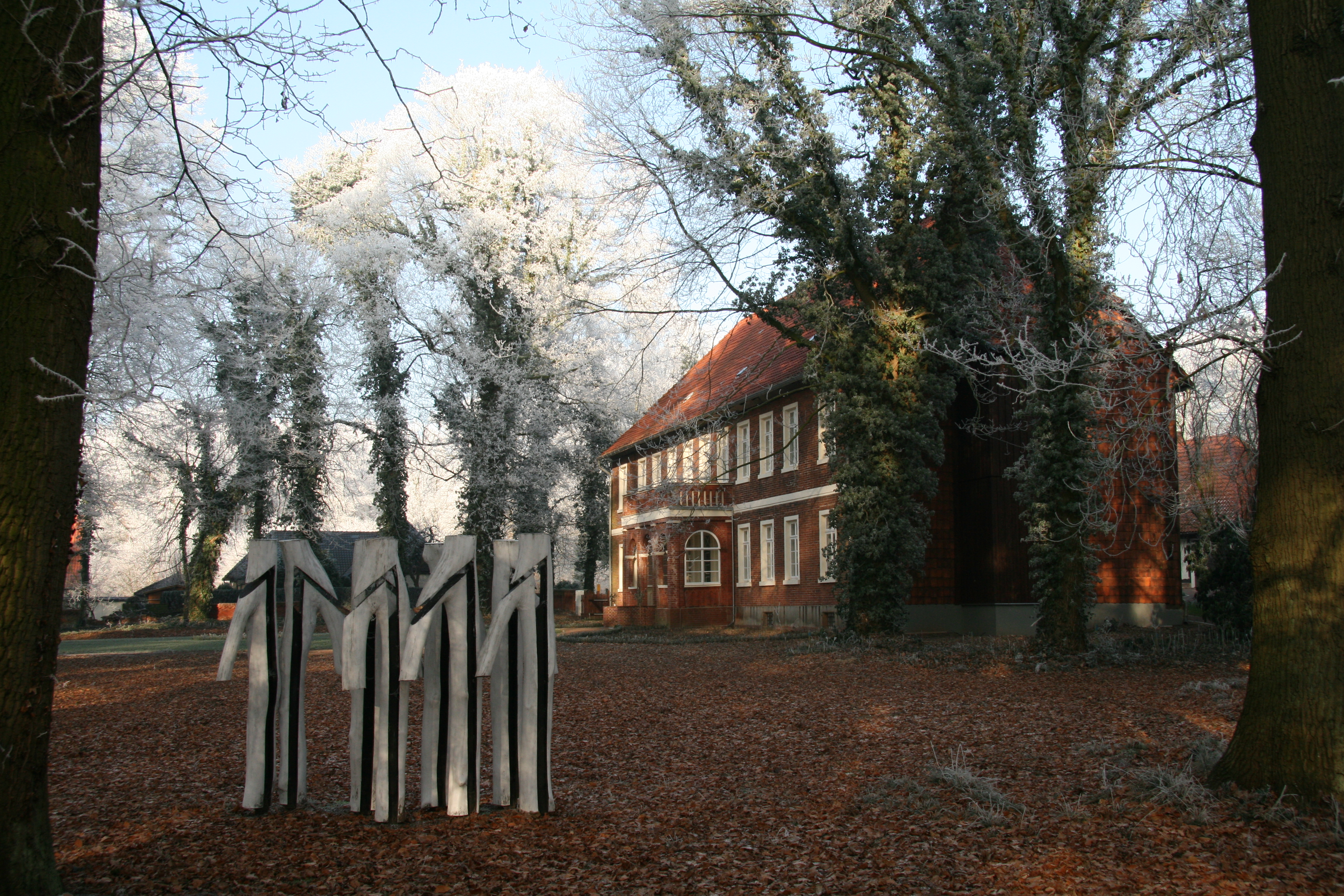 Louis Niebuhr, Waldgeflüster, 2002, Buche, aufgenommen vor dem Syker Vorwerk - Zentrum für zeitgenössische Kunst